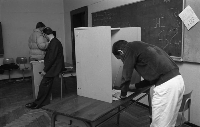 25.1.1987 Wahllokal in Bonn 9, Dorotheenstraße 126 Bürger bei der Stimmabgabe